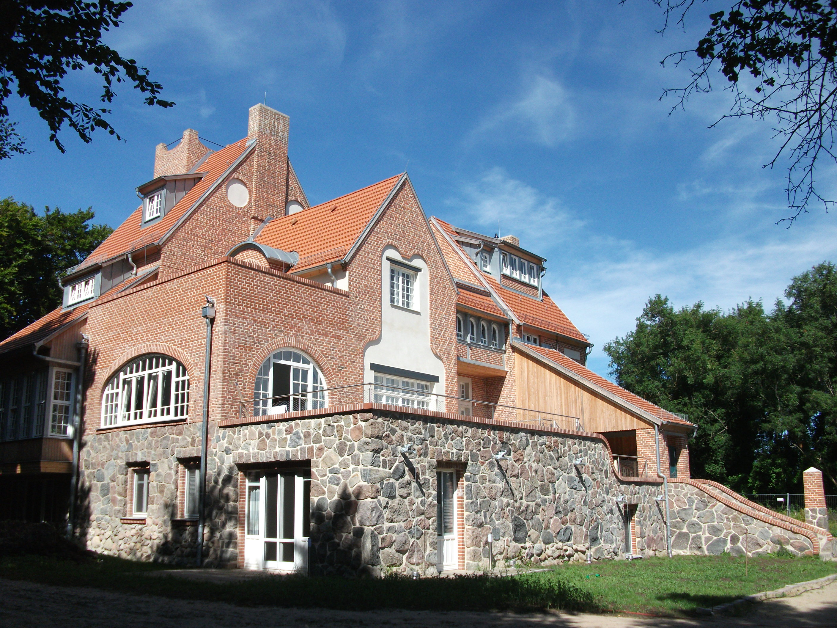 Die 1905 von dem Maler Oskar Kruse erbaute Lietzenburg auf Hiddensee ist eines der bedeutendsten Kulturdenkmäler der Insel Hiddensee. Sie ist ein auf einer Anhöhe unweit der Ostsee errichtetes Jugendstilgebäude mit einer reich gegliederten Backsteinfassade über einem Granitsockel. Im Sommer 2013 wurde sie nach über 20-jährigem Leerstand und vierjähriger denkmalgerechter Sanierung als Gästehaus wieder eröffnet.